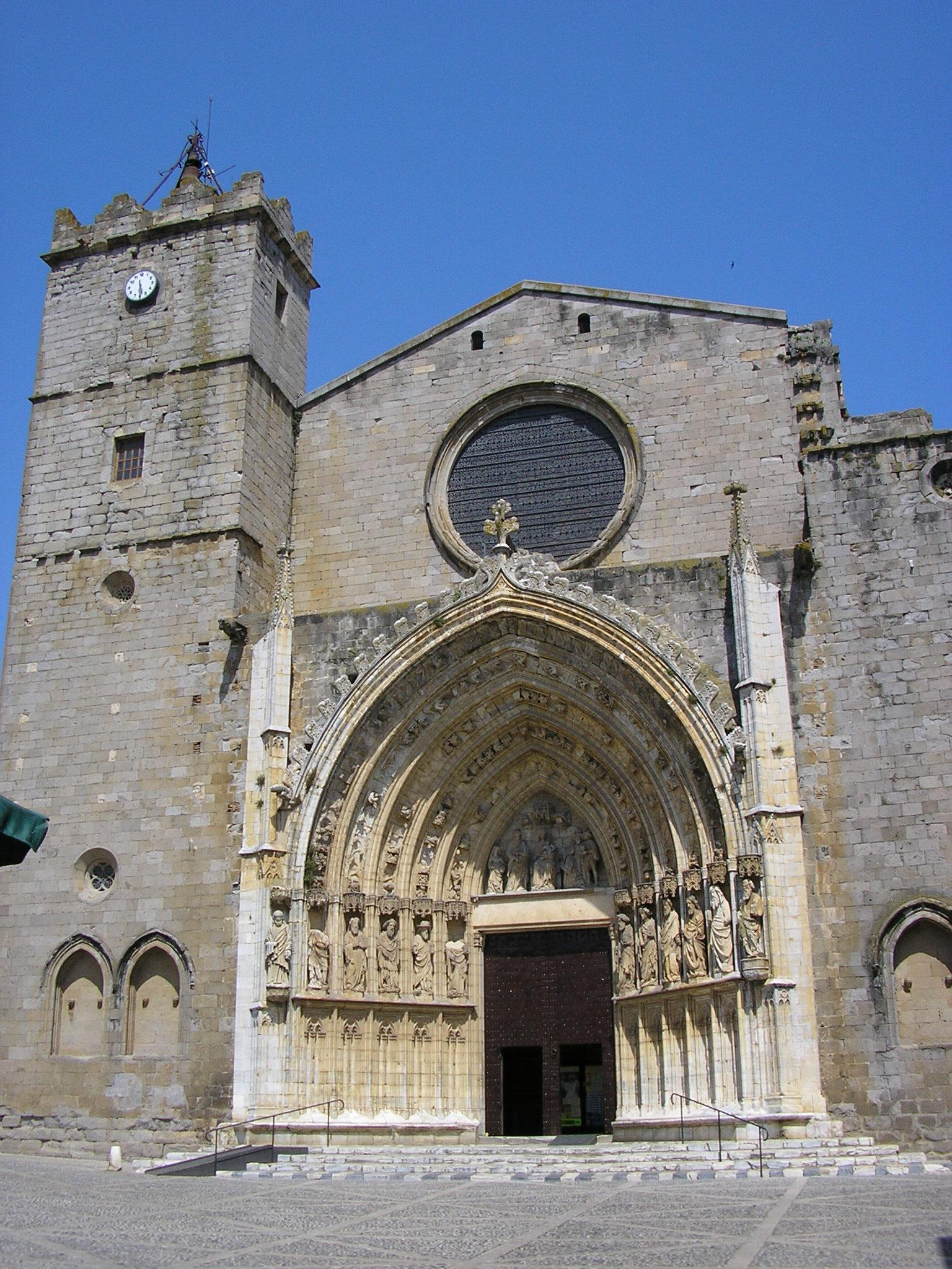 Catedral de Castelló d'Empúries.